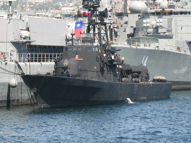 Misilera Casma